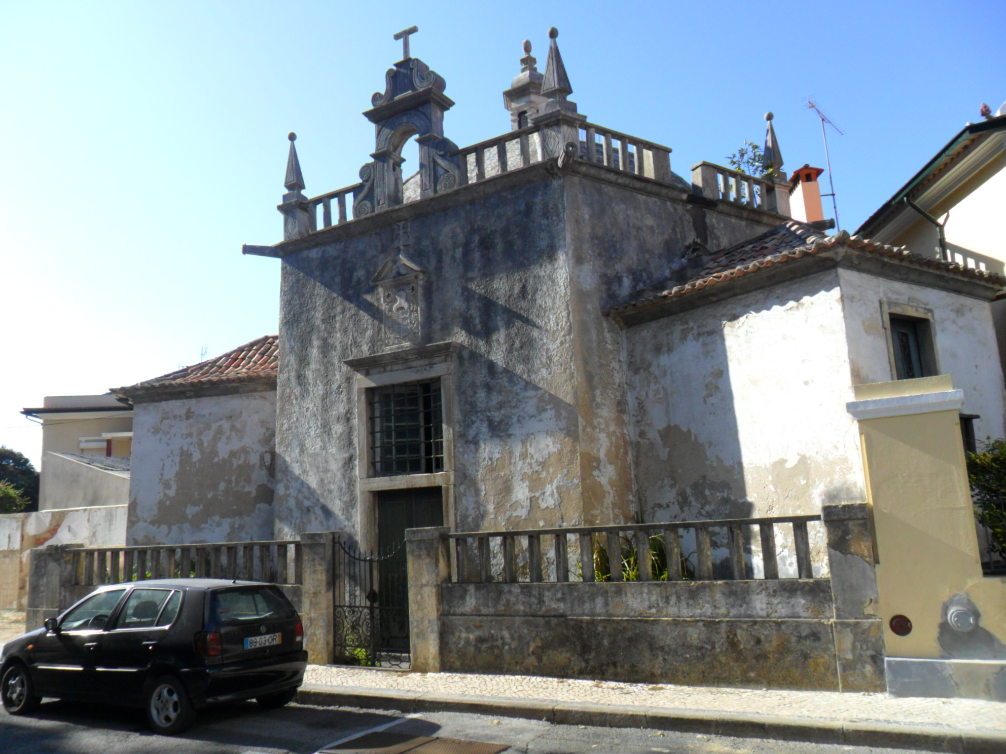 ... com casa do Seixal defronte da rua This file was uploaded for Wiki Loves Monuments in Portugal with the unique identifier 74837.